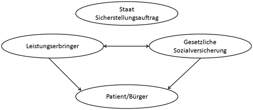 Das Sozialversicherungsmodell